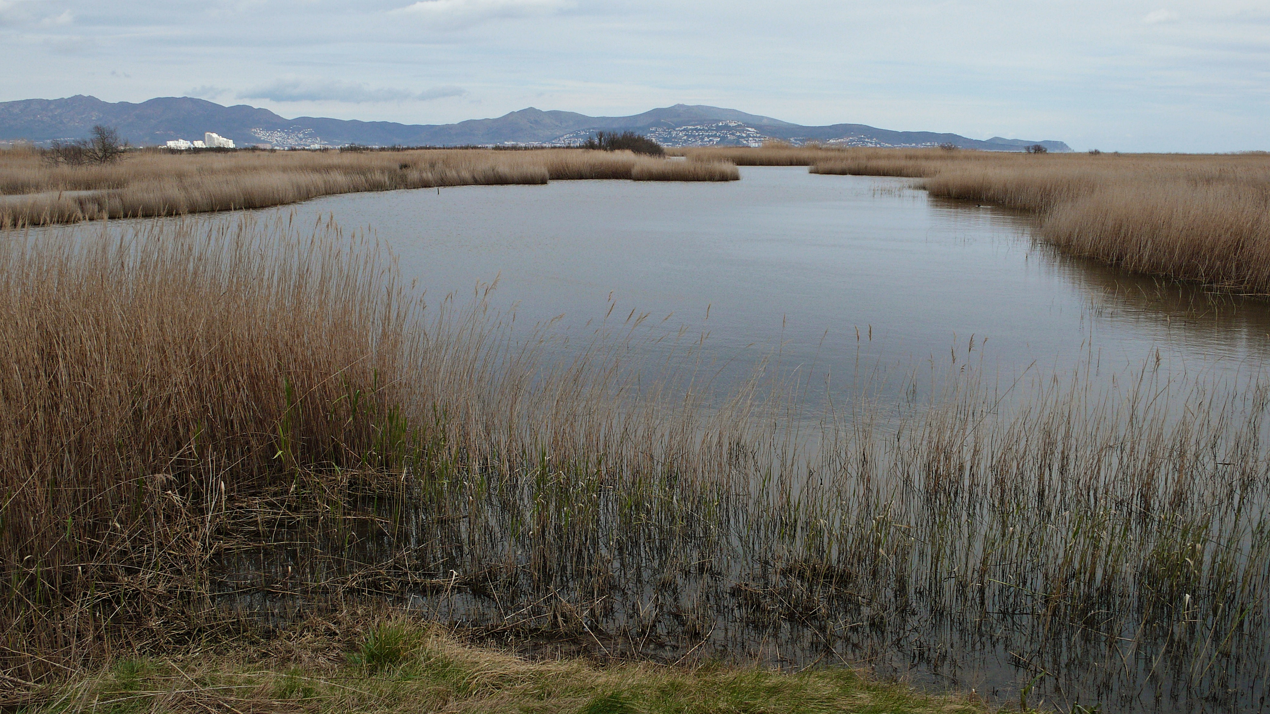 alt emporada-cataluña